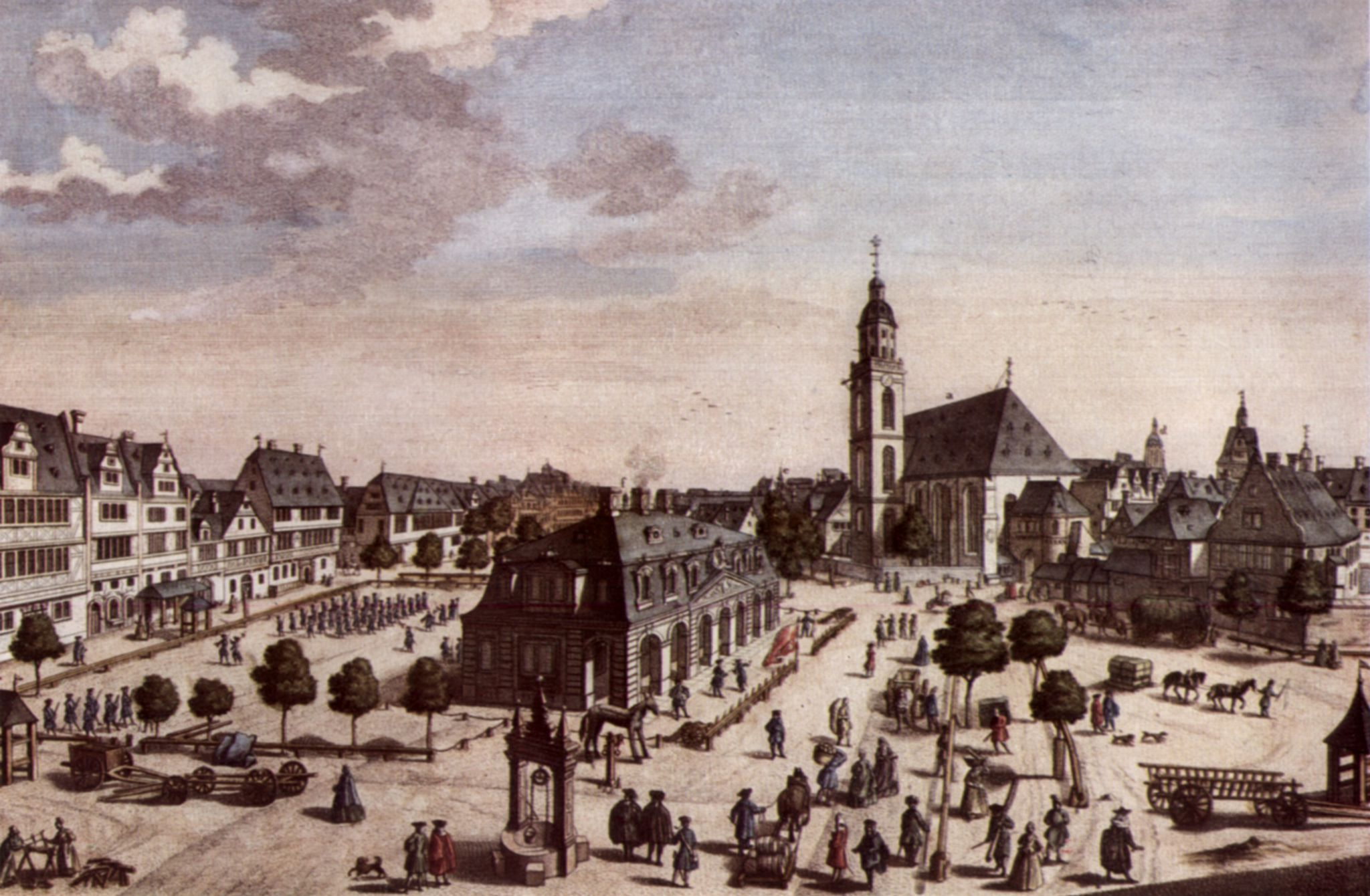 kolorierter Kupferstich 21 x 32 cm; Hauptwache mit Blick in die Zeil von Südwesten 1738